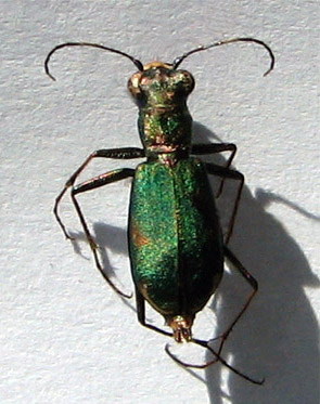 Cicindela germanica = Cylindera germanica